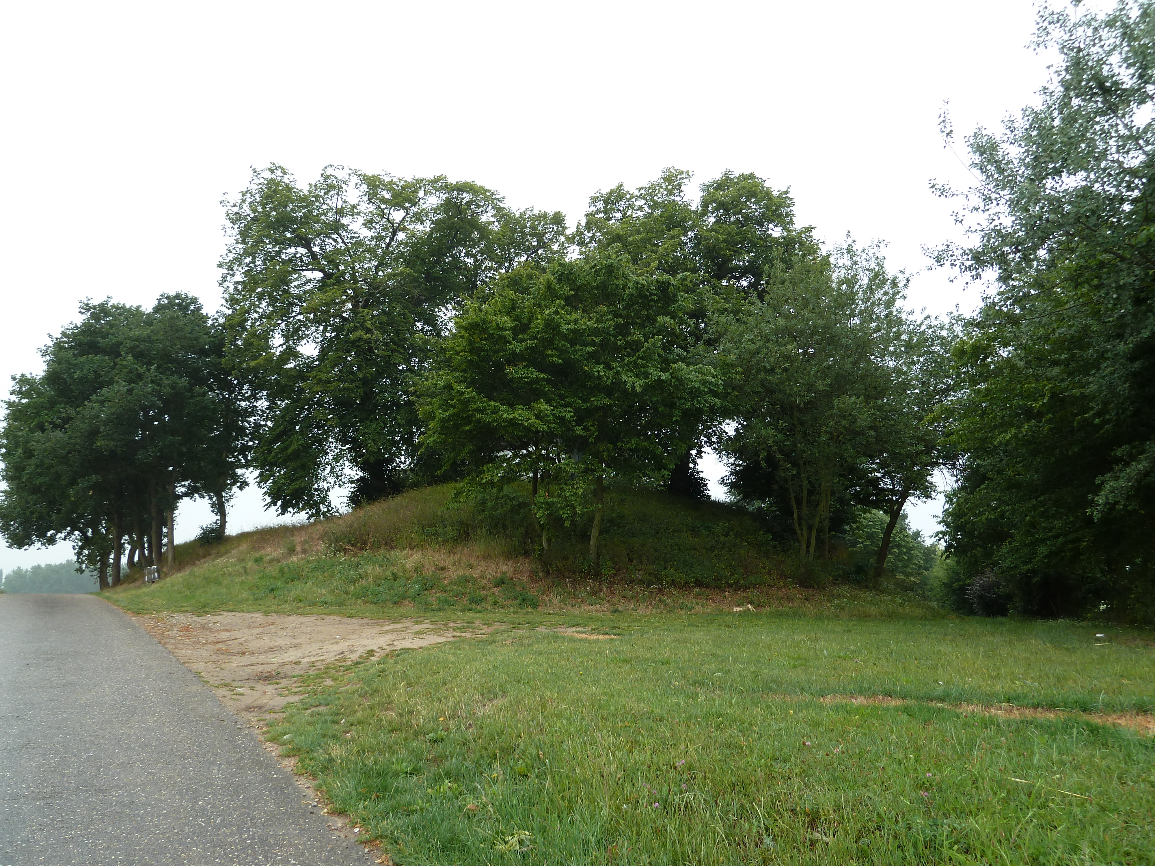 Tumulus d'Otrange, Oreye, Belgique